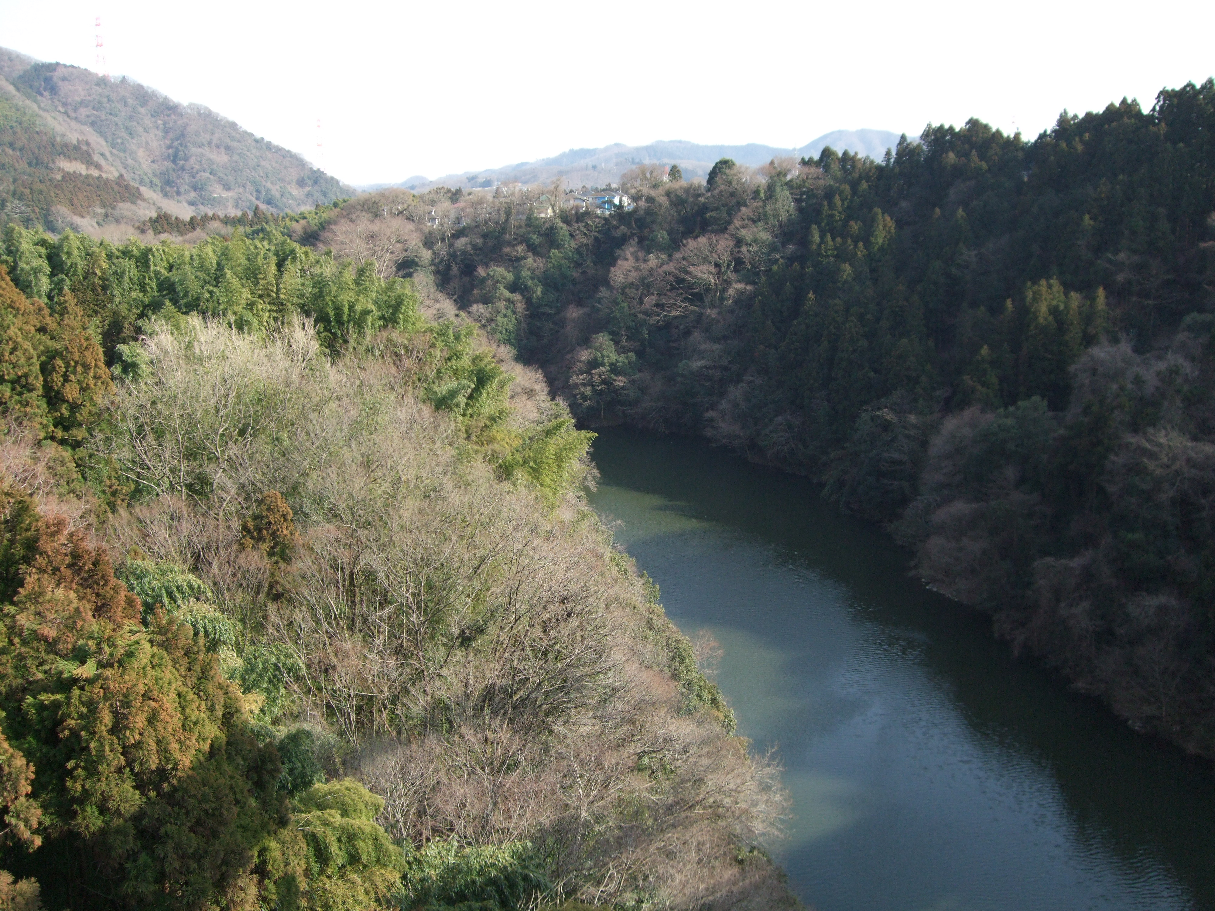 Sagamigawa-katsurabashi